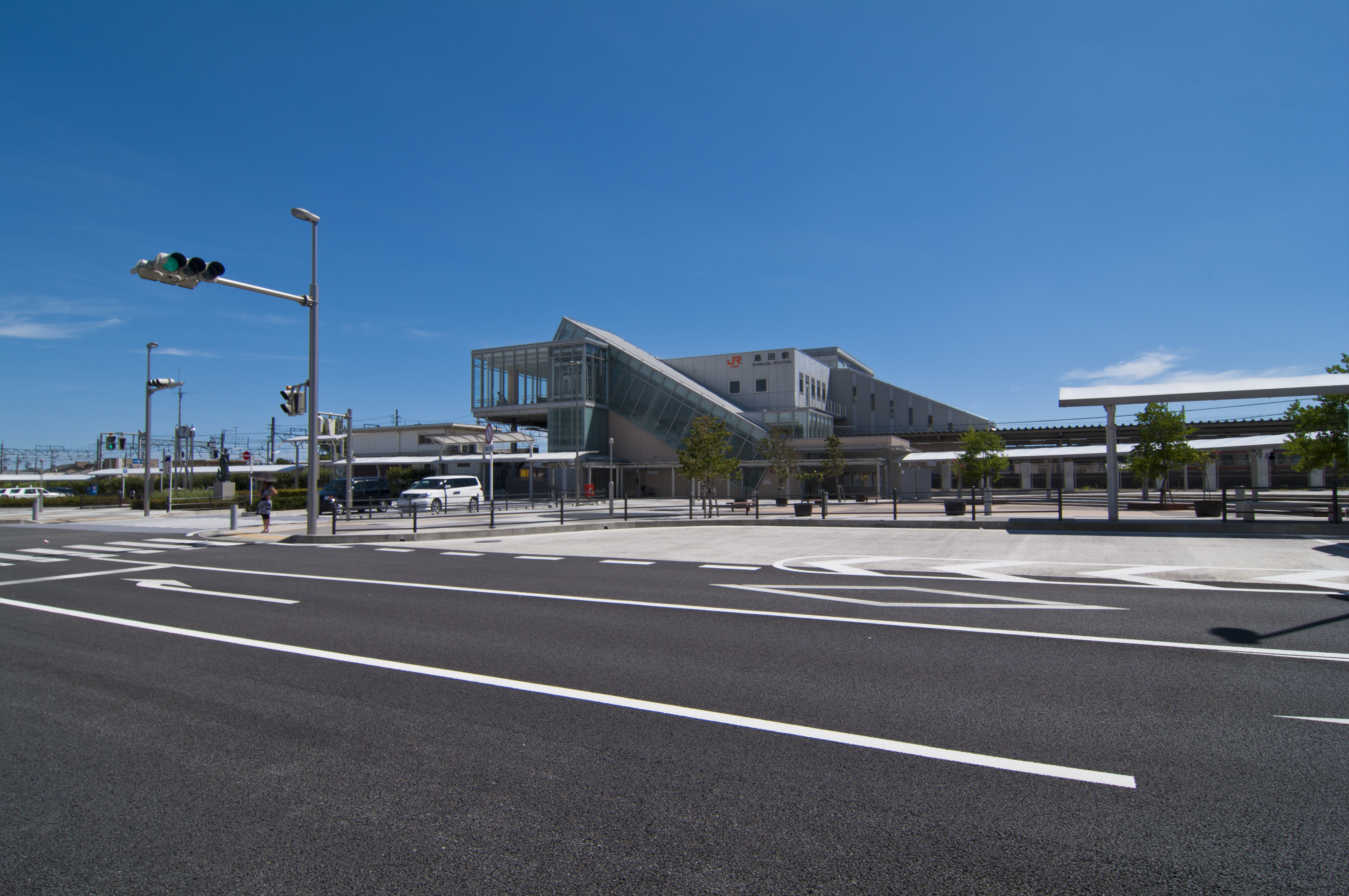 東海道本線島田駅